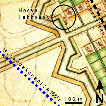 Fragment van de handgetekende versie van het Plan Moreelse voor stadsuitbreiding van Utrecht. De kaart is zodanig geroteerd dat het noorden bovenaan ligt. In de cirkel ligt een hoeve die van Hugo Ruysch met nr. 34 is aangeduid. In de legenda schreef hij 34 Lubbenes. Van de vestingwerken kwam niets terecht, maar de (dunne) bestaande kavellijnen en bebouwing zijn zeer nauwkeurig ingetekend.